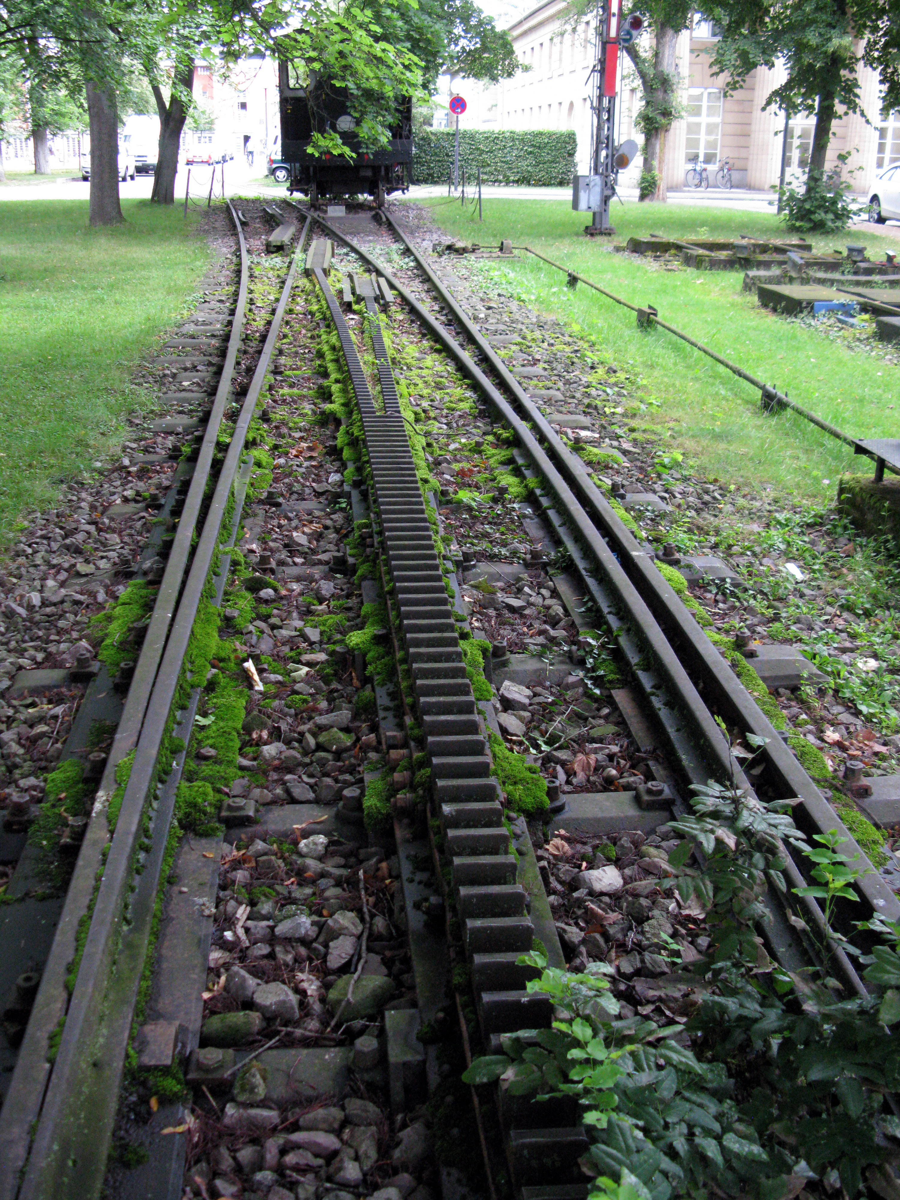 Zahnstangenweiche wie sie auf der Höllentalbahn (Schwarzwald) Verwendung fand, heute auf dem Campus der Uni Karlsruhe, Institut für Straßen- und Eisenbahnwesen